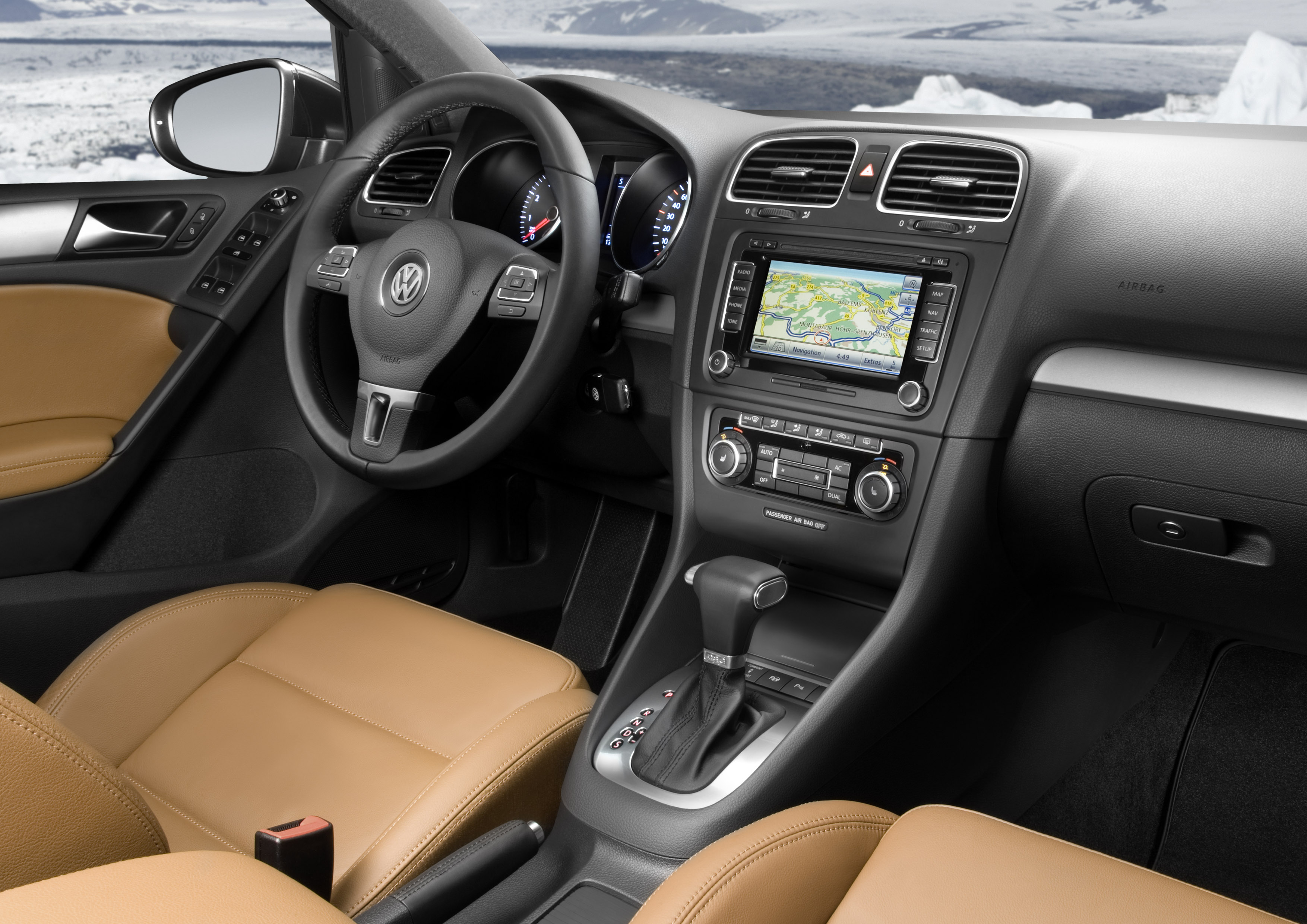 VW Golf VI Interieur